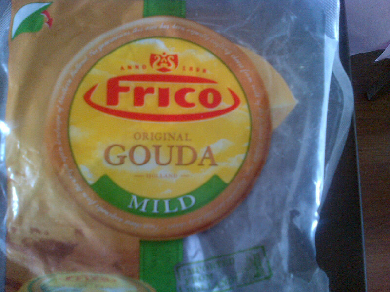 Queso gouda.